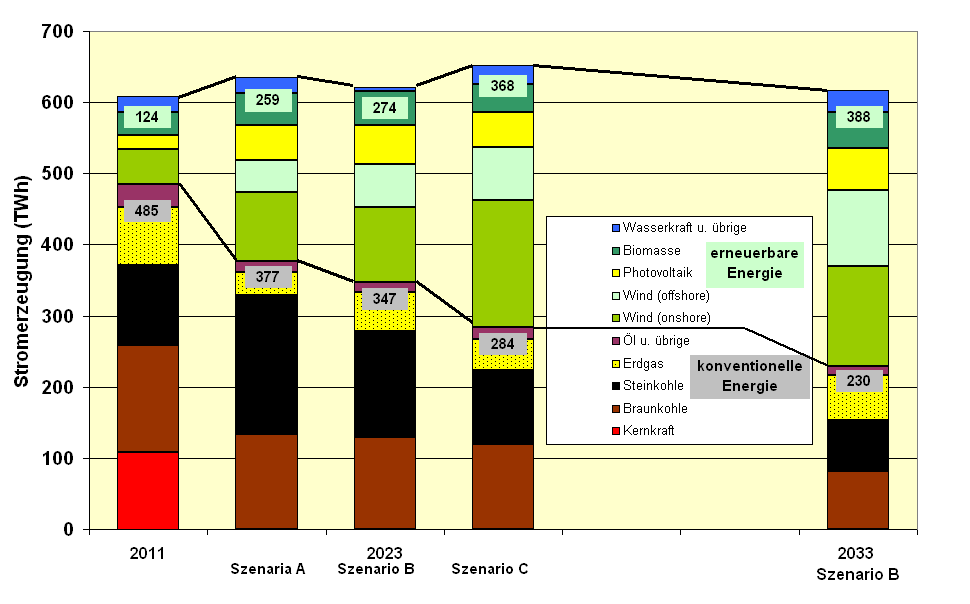 Stromerzeugung in Deutschland 2011, 2023 und 2033, Grundlage für den Netzentwicklungsplan 2013